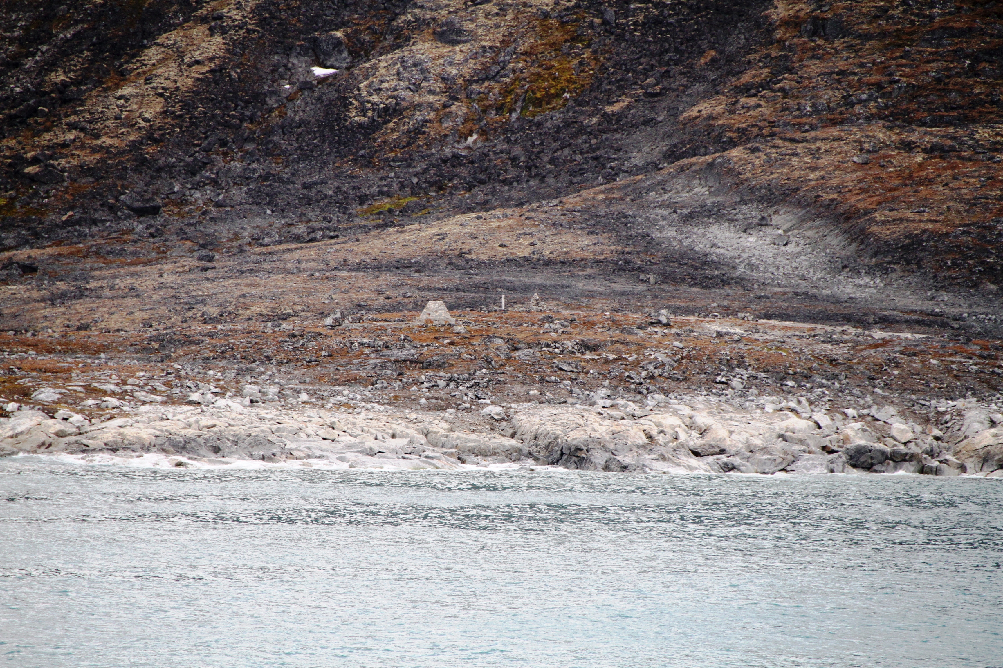 Gravneset dutch whaling graves field, Magdalenefjord, svalbard